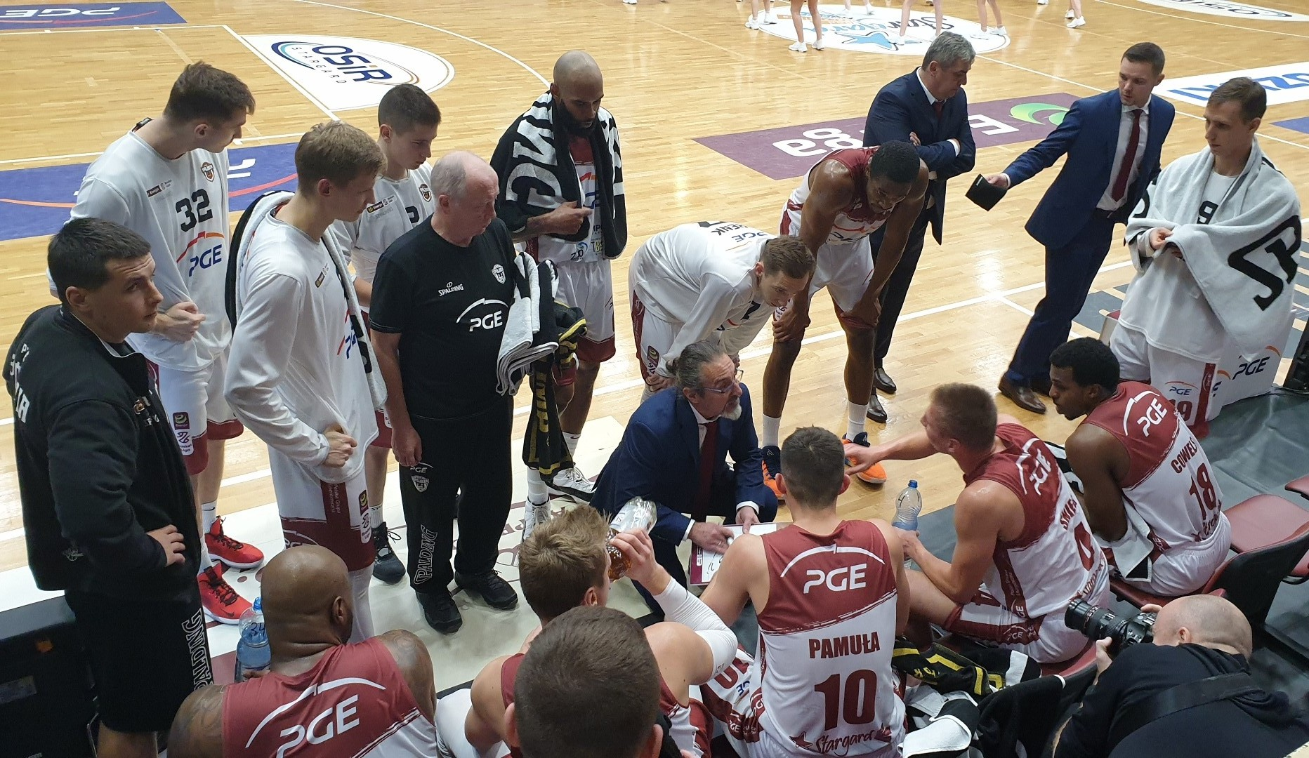 PGE Spójnia Stargard